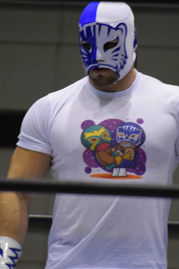 2017年1月13日 大阪府立体育会館・第二競技場「CMLL FANTASTICA MANIA 2017」 ブルー・パンテル・ジュニア